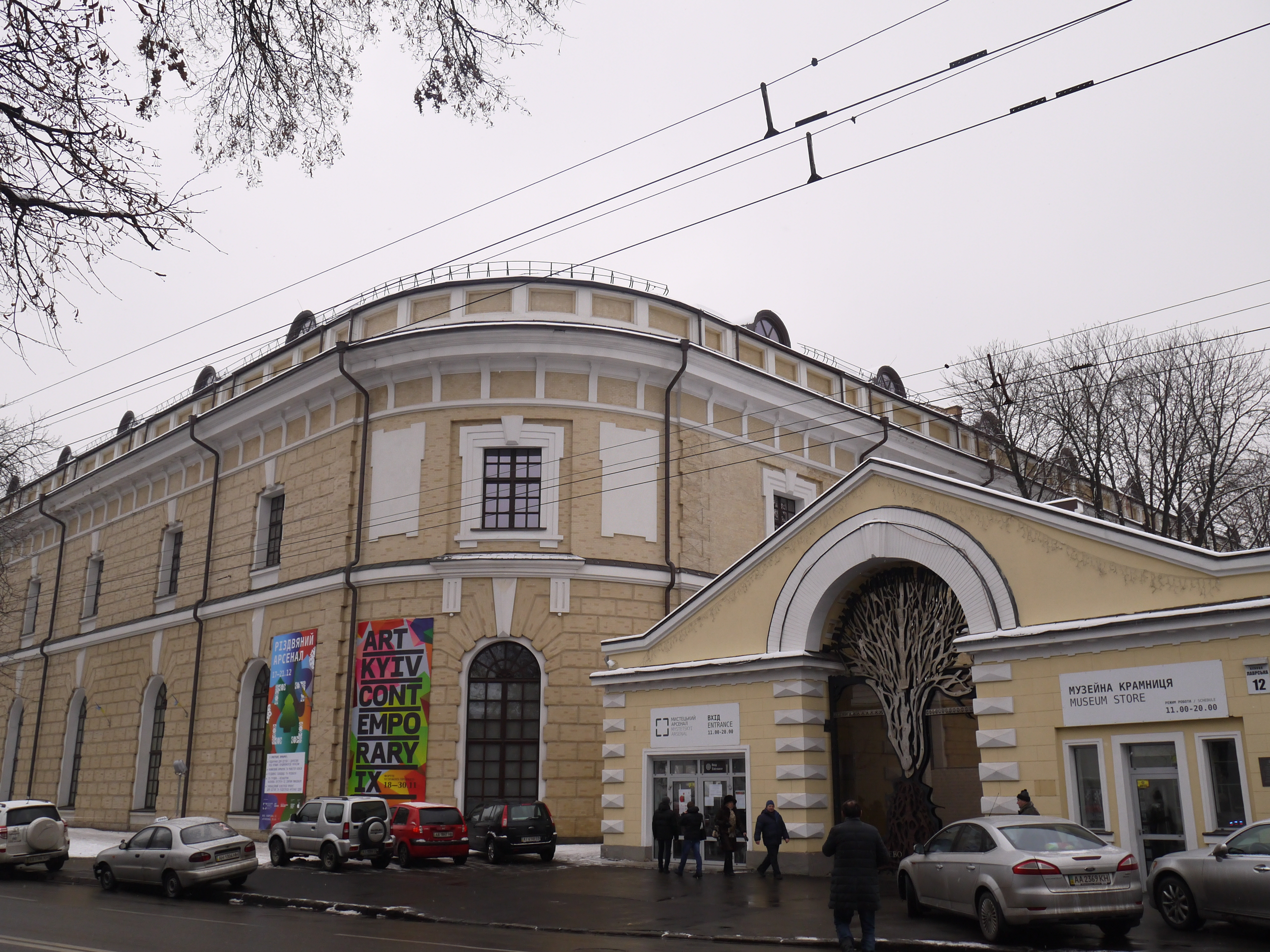 Арсенал (меморіальний будинок, де працював Я. Андрієвич, декабрист), Київ, Лаврська вул., 12